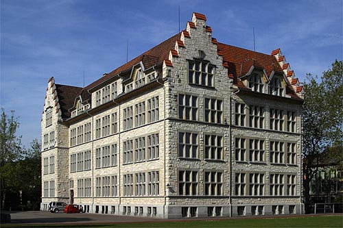 Primarschule „Geiselweid“ in Winterthur (Nr. 03.1-5417)